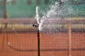 Ihinztagailu bidezko ureztatze-lanak